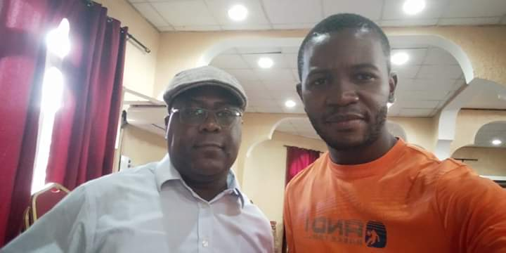 Décembre 2018 à Goma, seul journaliste à avoir accompagné partout Félix Tshisekedi qui deviendra président de la République, en campagne électorale.